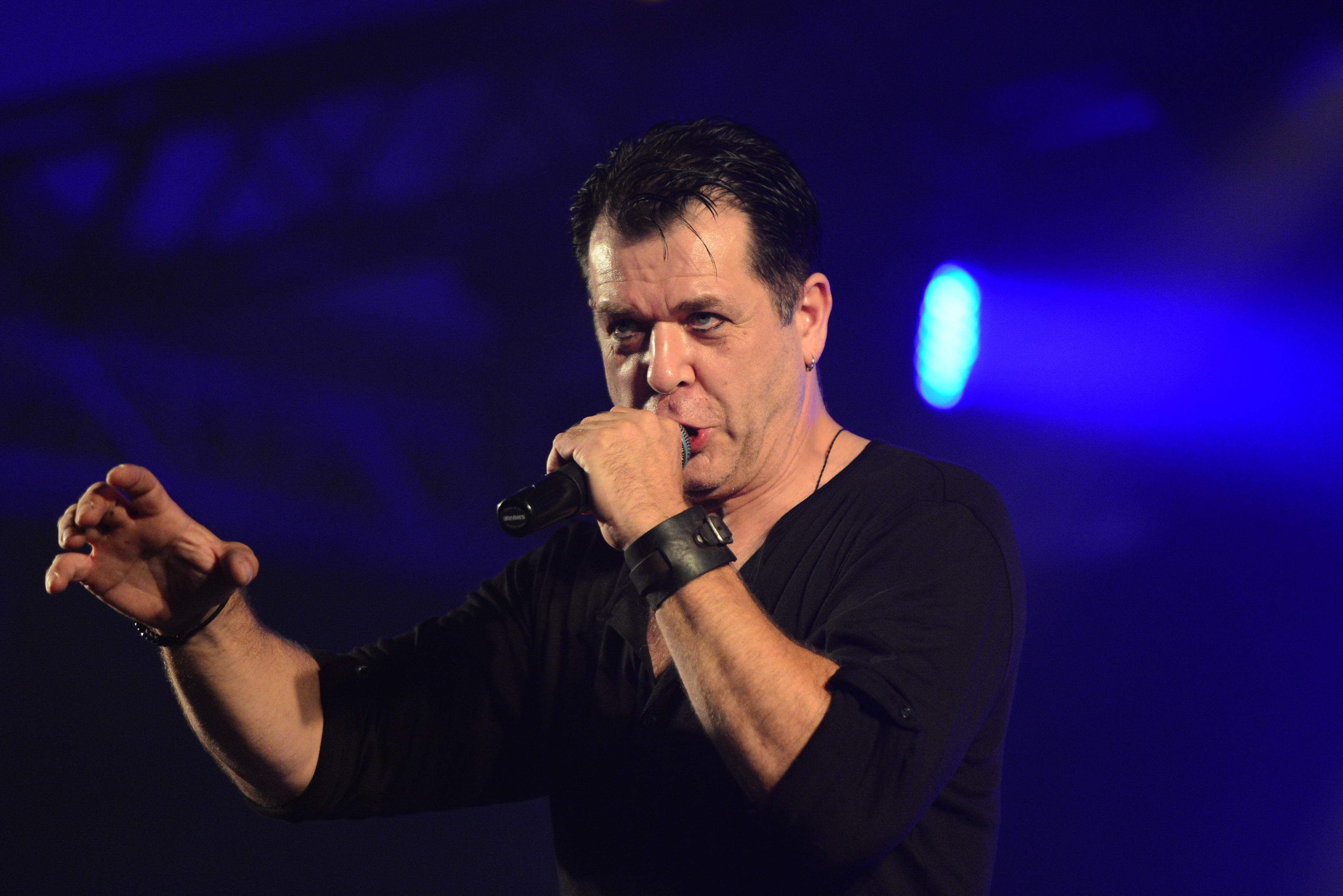 Maerzfeld, Amphi festival 2014